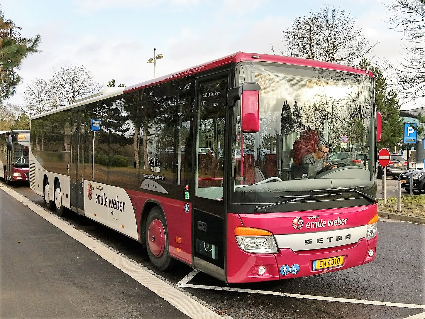 Luxembourg, autobus EW4310, société Émile Weber, ligne 303 au terminus "Kirchberg, Gare routière Europe"